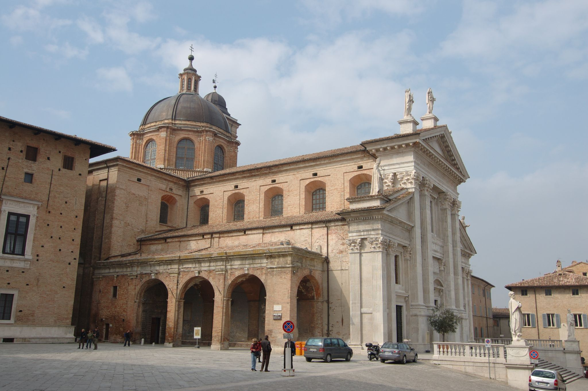 Urbino, Marche, Italia